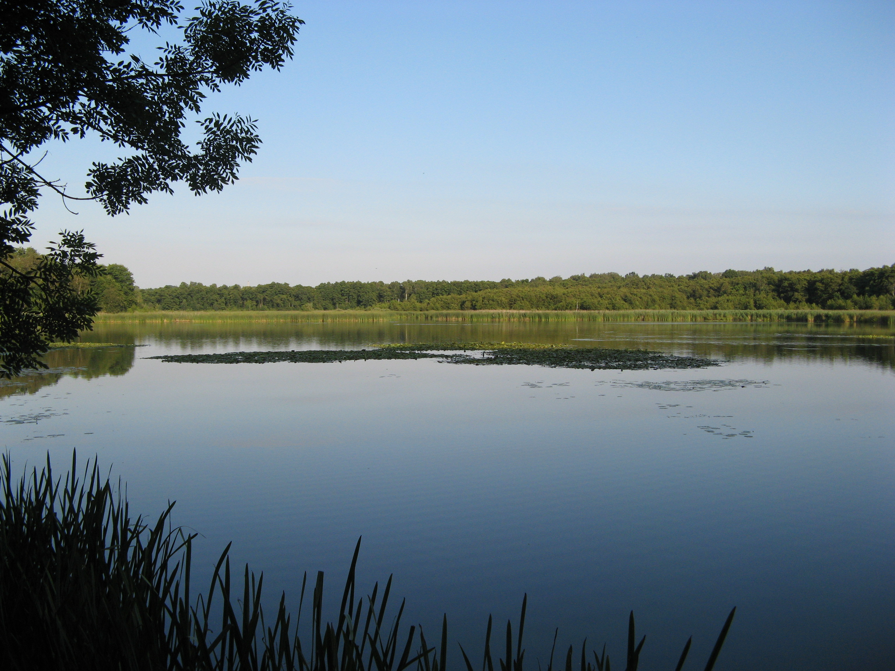 Rezerwat przyrody Łężczok panorama na staw Brzeziniak